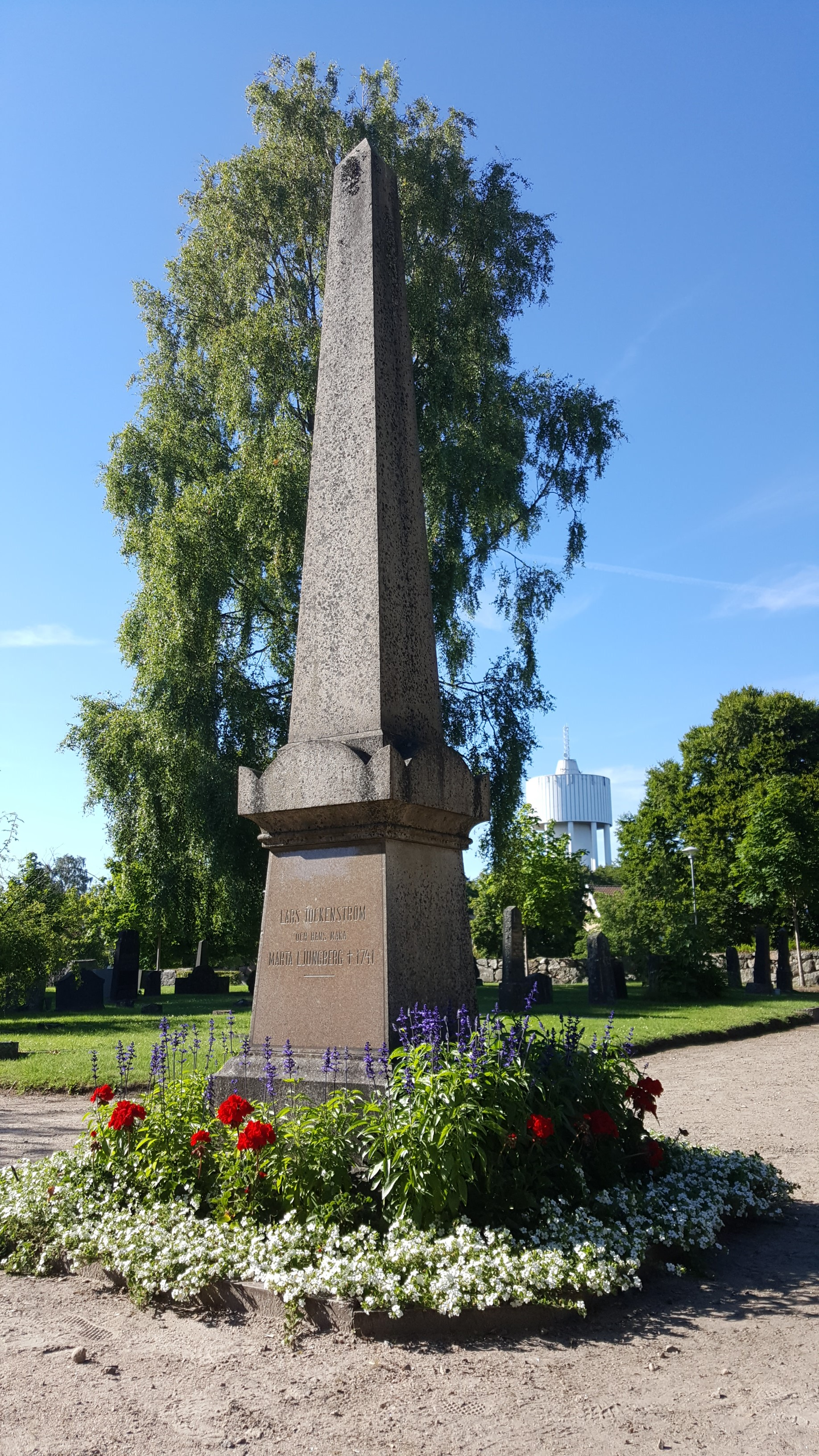 En obelisk som markerar den plats man tror är Märta Ljungbergs, och hennes makes, viloplats när hon låg begravd under kyrkgolvet.